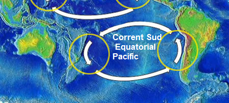 Assenyalament del Corrent Sud Equatorial del Pacífic dins del Gir Oceànic del sud del Pacífic.